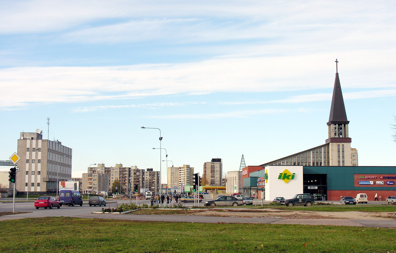 Mažeikiai 2006 m. lapkričio 3 d.